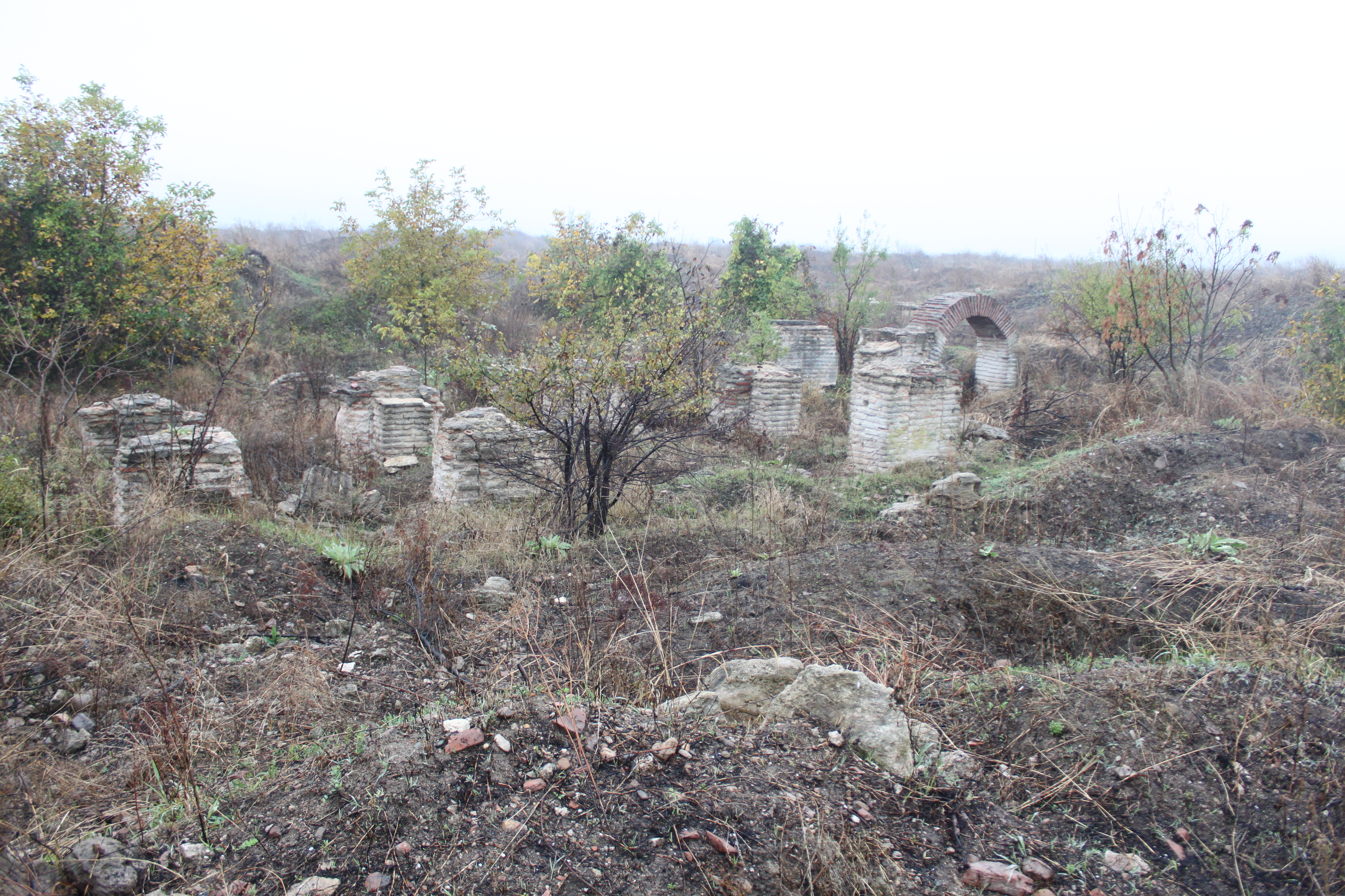 die antike römische Stadt Ratiaria; bei Archar an der Donau - östlich von Widin; das ca. 2x2 km große Gelände wurde von Schatzsuchern monatelang systematisch mit Baggern umgegraben und durchsiebt, so dass alle archäologischen Schichten und Funde zerstört sind; nur an einer Stelle ist ein gemauerter Bogen übrig geblieben